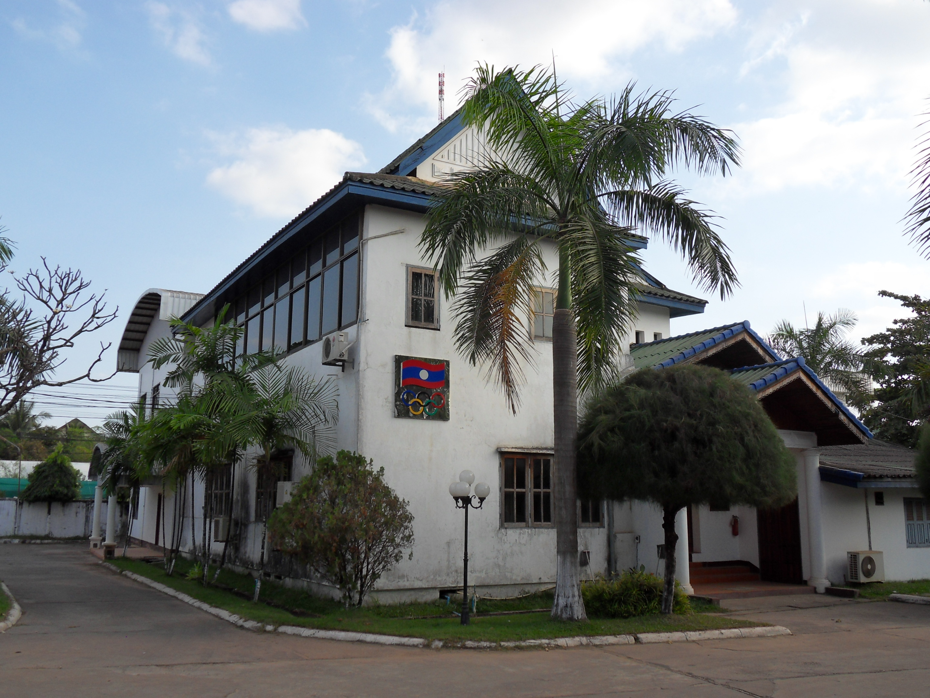 Bâtiment du comité olympique laotien dans l'enceinte du stade Anouvong.